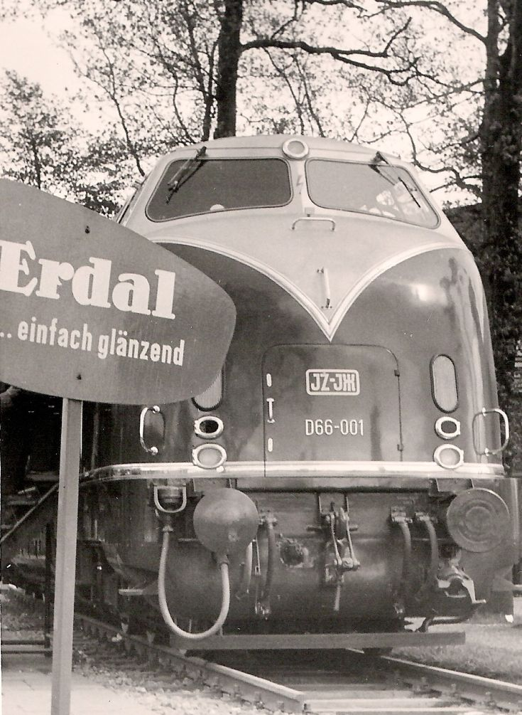 Sechsachsige Krauss-Maffei-Diesellok ML 2200 CC für die Jugoslawischen Staatsbahnen